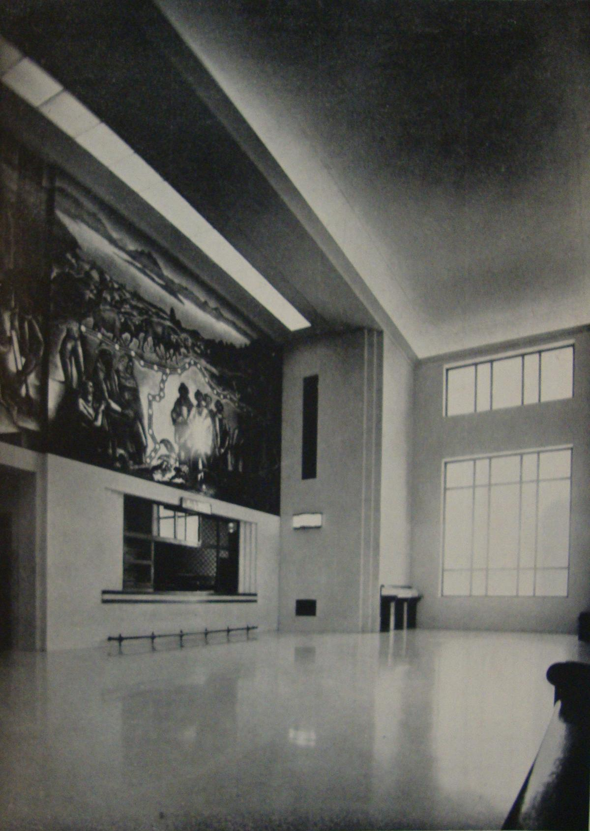 Hall del edificio construido para Ferrocarriles del Estado. Murel de Rodolfo Franco. Actualmente Tribunales Federales, Av. de los Inmigrantes nº 1950.